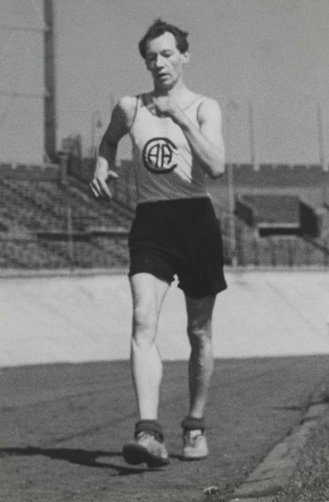 Olympische spelen 1936. Voorbereiding in het Olympisch Stadion in Amsterdam voor de Olympiade in Berlijn van de snelwandelaar Anton Toscani op het onderdeel 50 km. snelwandelen.